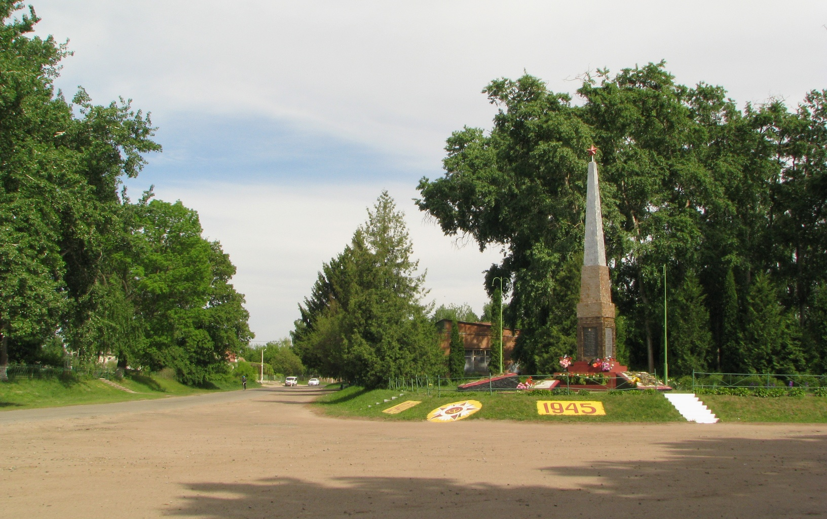 Братська могила 9 радянських воїнів, які загинули при звільненні села у вересні 1943р. та пам’ятний знак 264 воїнам-односельчанам, загиблим в роки Великої Вітчизняної війни, с. Марківці, центр